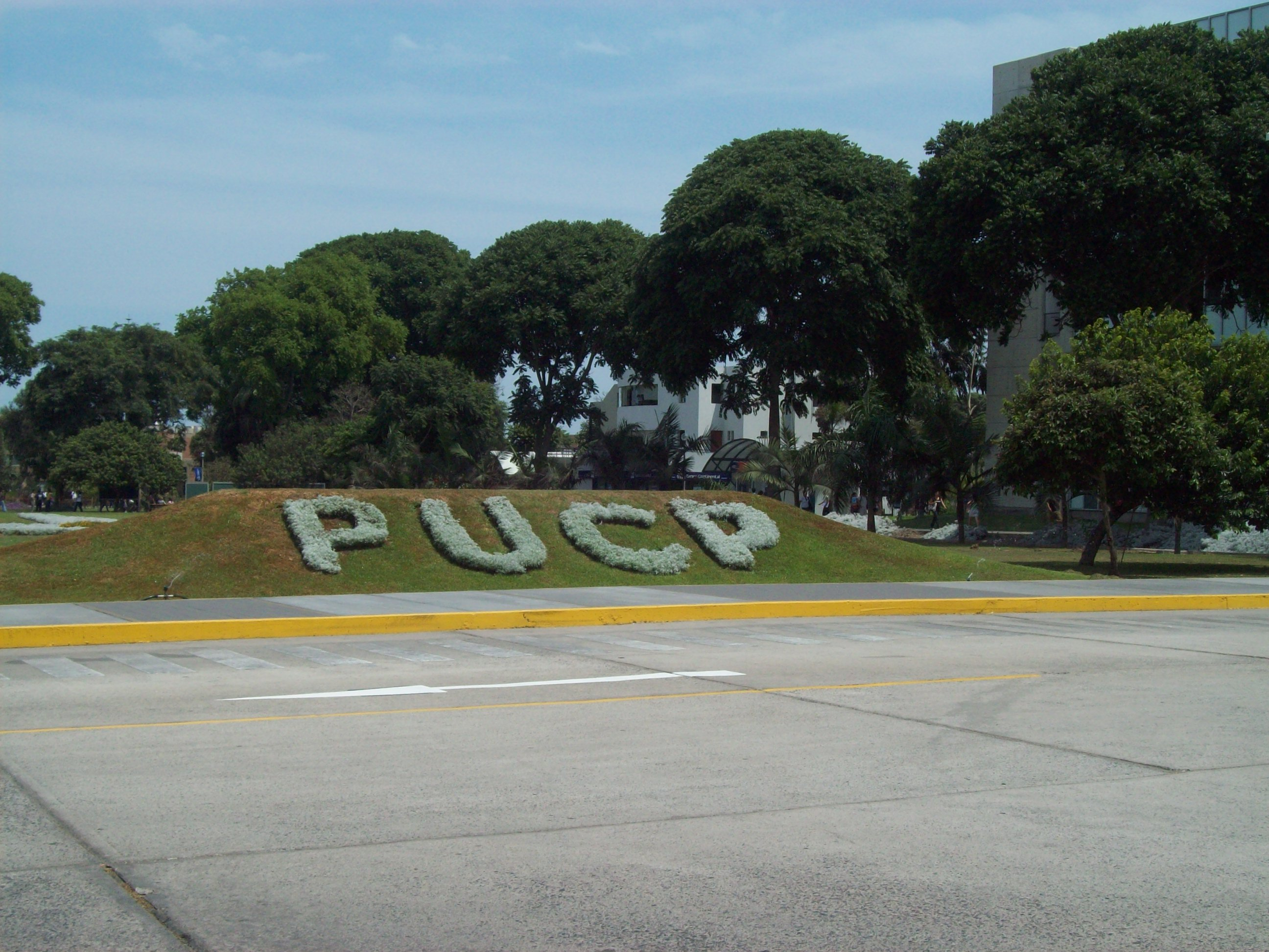 Jardín visto desde el ingreso principal del campus.